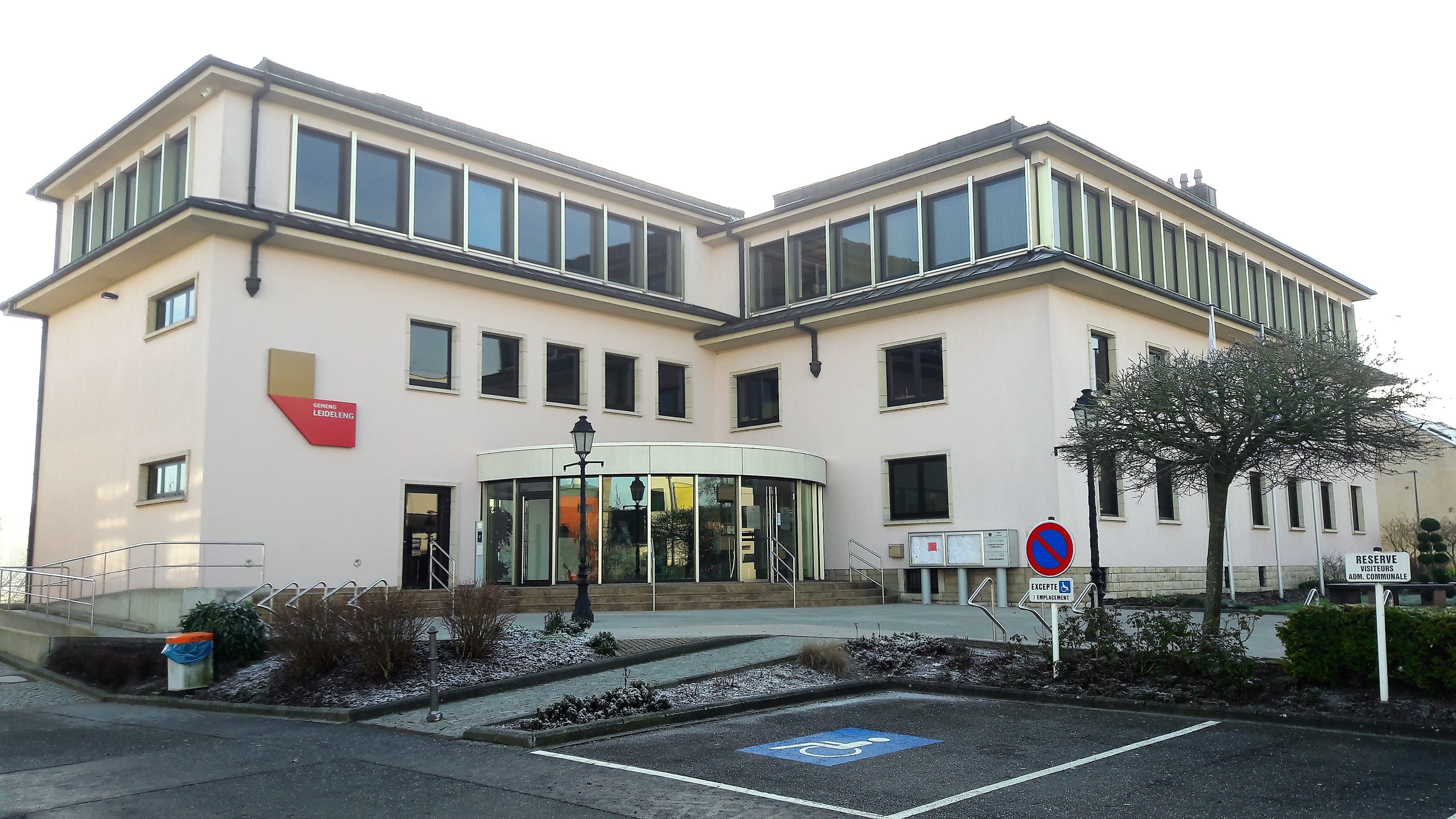 D'Leidlelenger Gemengenhaus mam neie Logo